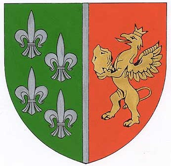 Coat of Arms of Niederleis in Austria/Wappen der Gemeinde Niederleis in Österreich